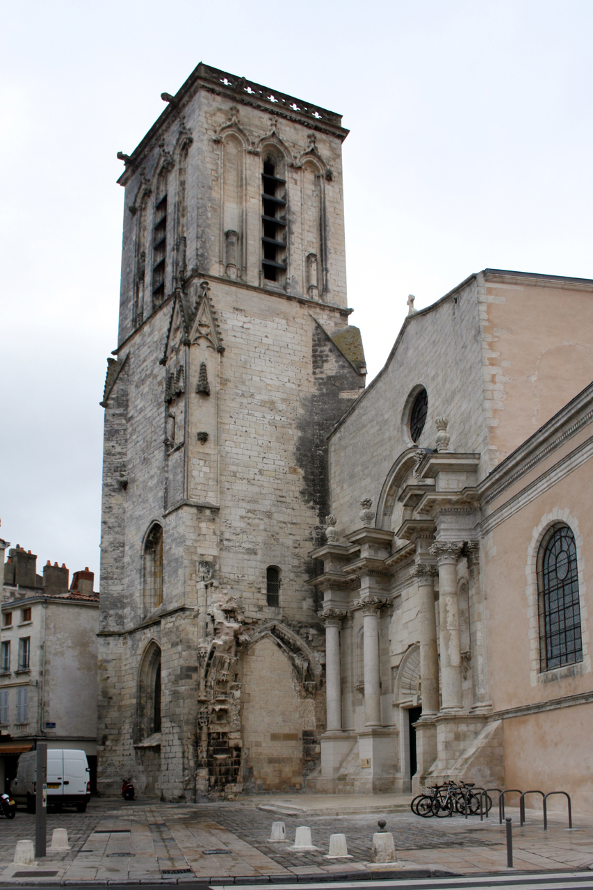 Eglise Saint-Sauveur à La Rochelle